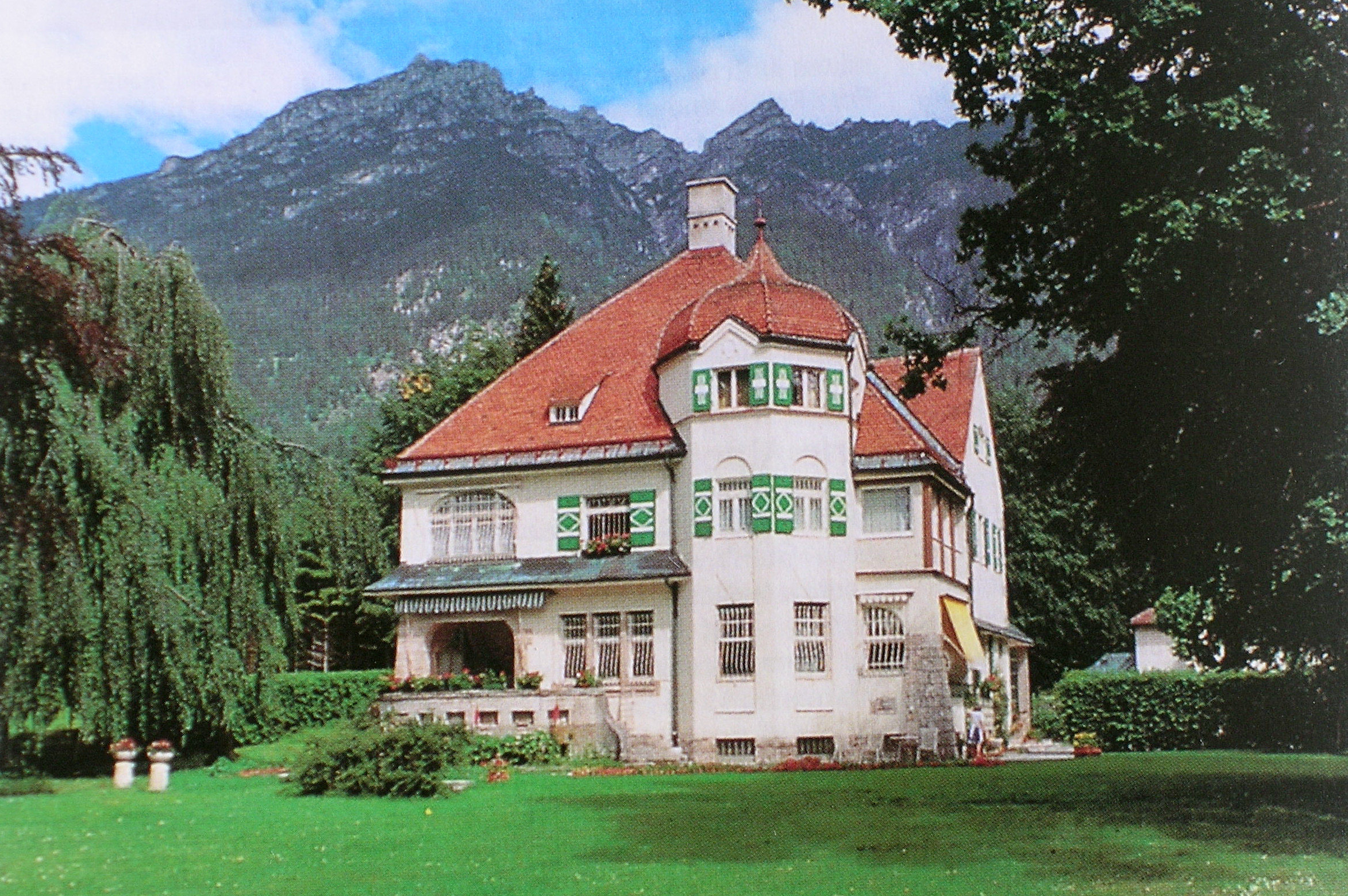 Richard Strauss Landhaus in Garmisch